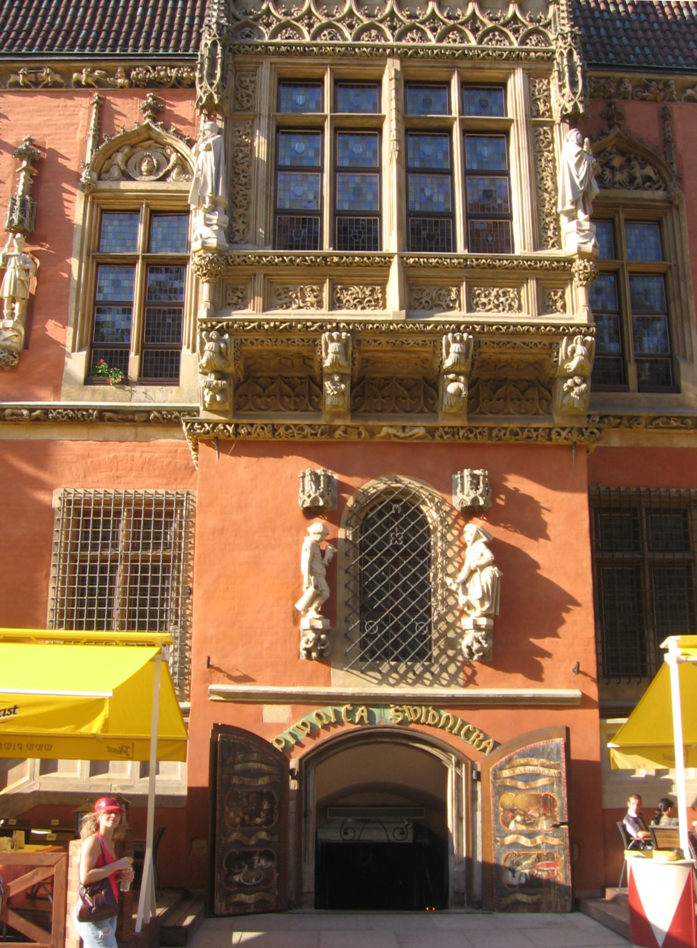 Wrocław, Rynek - Piwnica Świdnicka